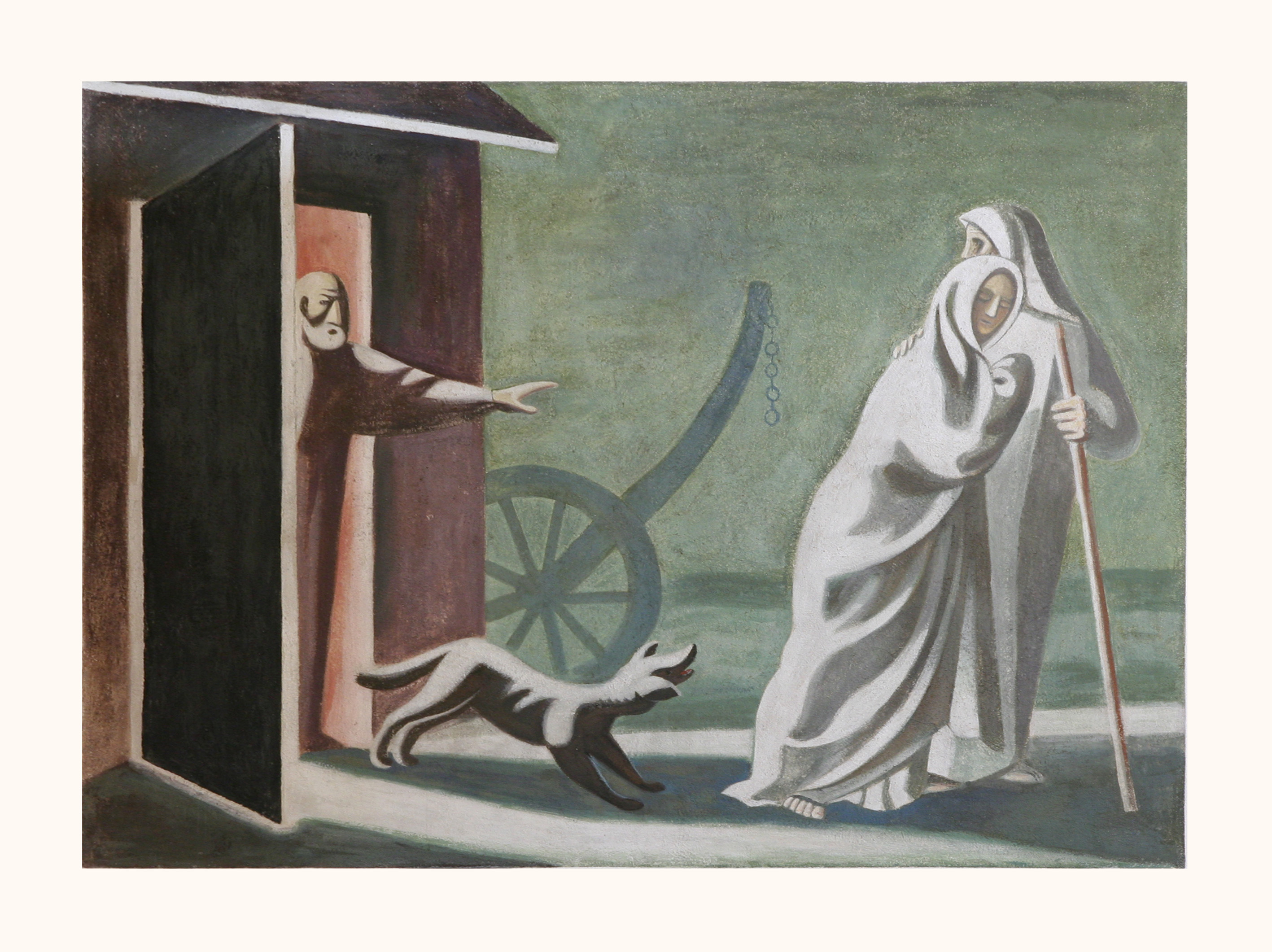 Römisch-katholische Pfarrkirche St. Theresia Zürich-Friesenberg, Fresko von Richard Seewald